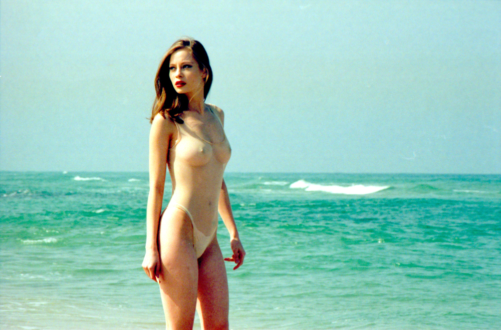 נינה ברוש מדגמנת